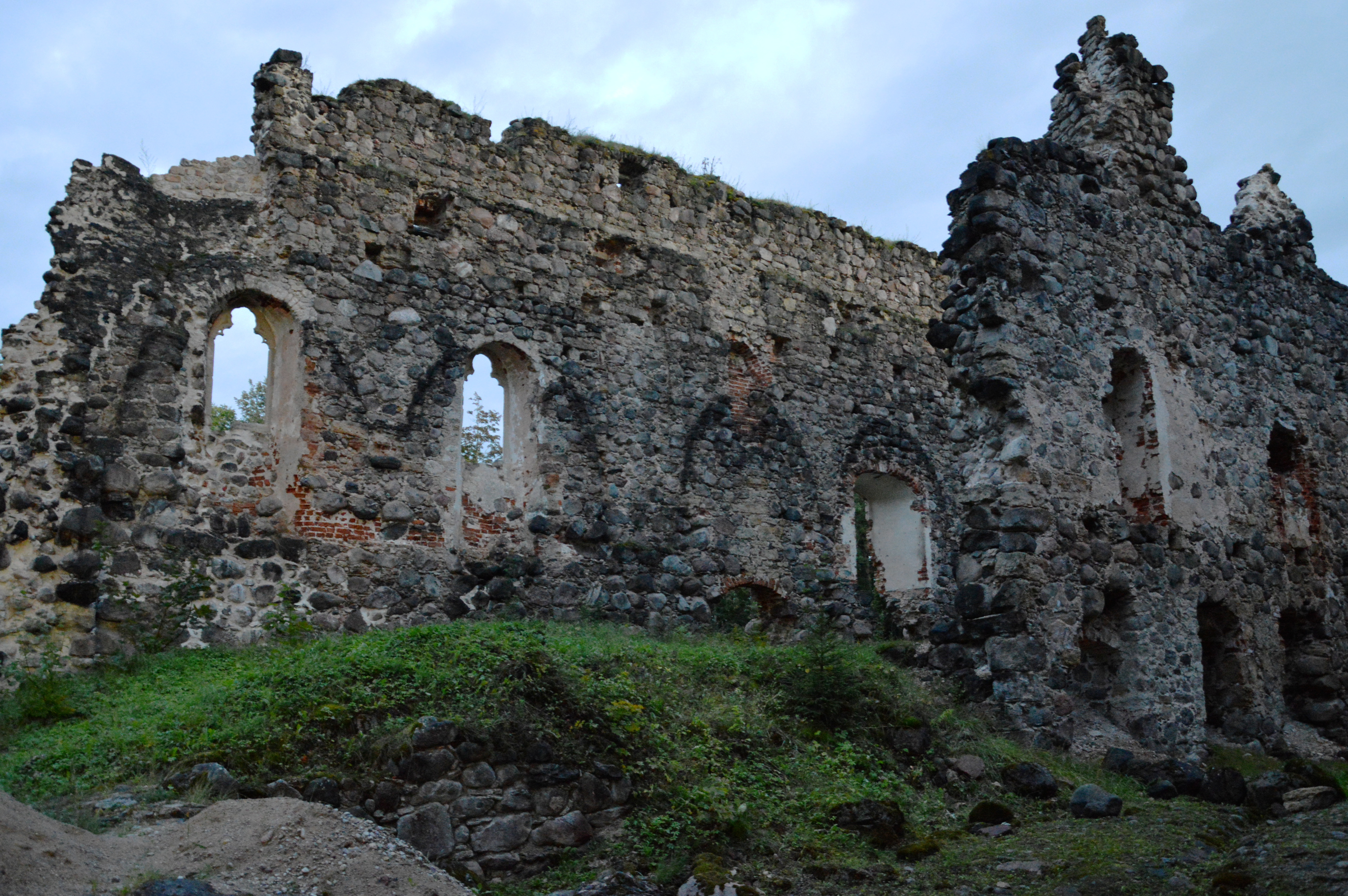 Rauna piiskopilinnus